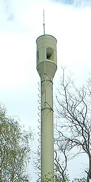 Bildbeschreibung: Hochleistungssirene von Pintsch-Bamag. Standort: Saarbrücken, Spielplatz Lerchesflurweg Quelle: Fotograf/Zeichner: Hans-Peter Dubiel Datum: 2004